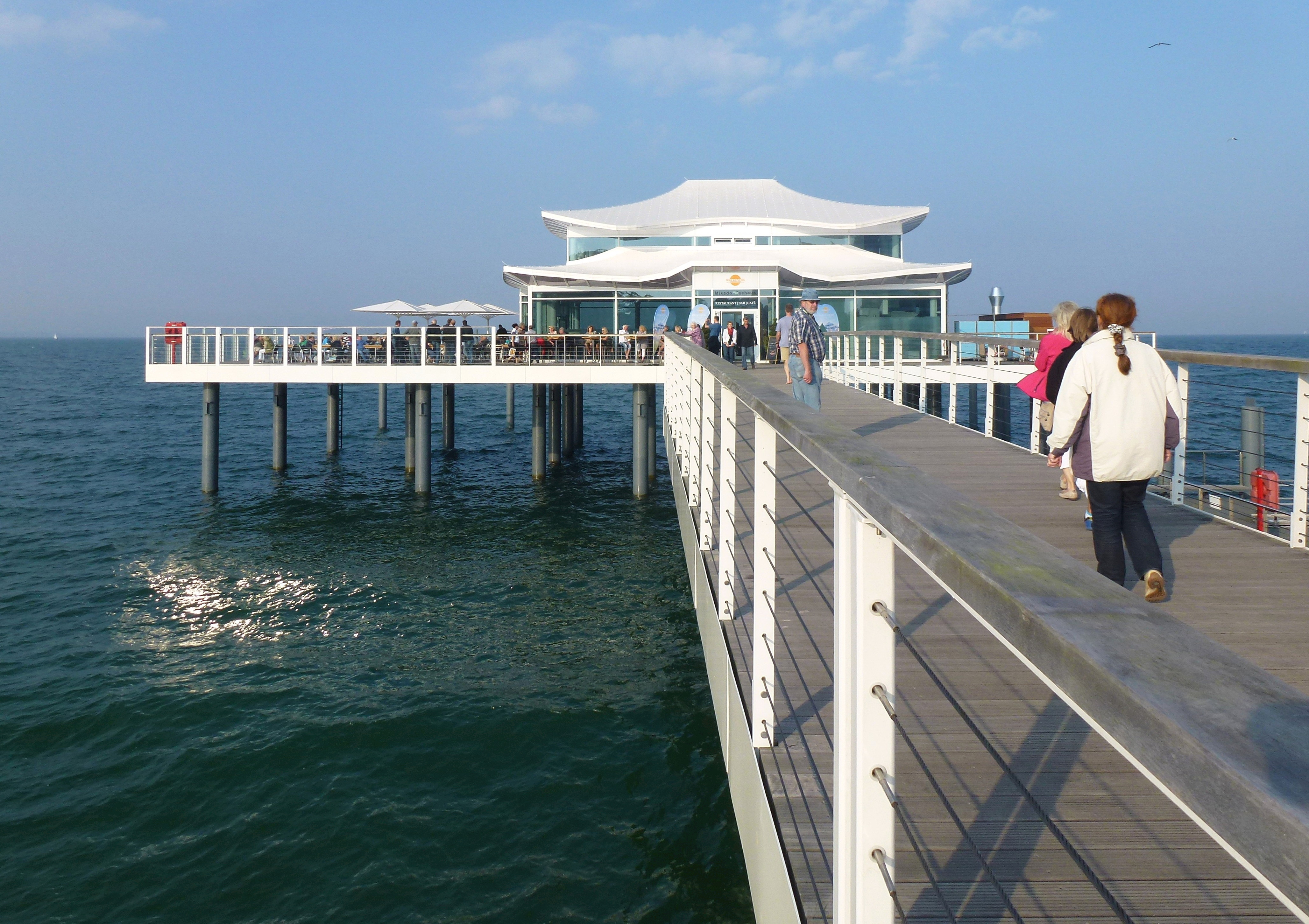 Timmendorfer Strand Seeschlösschenbrücke Teehaus